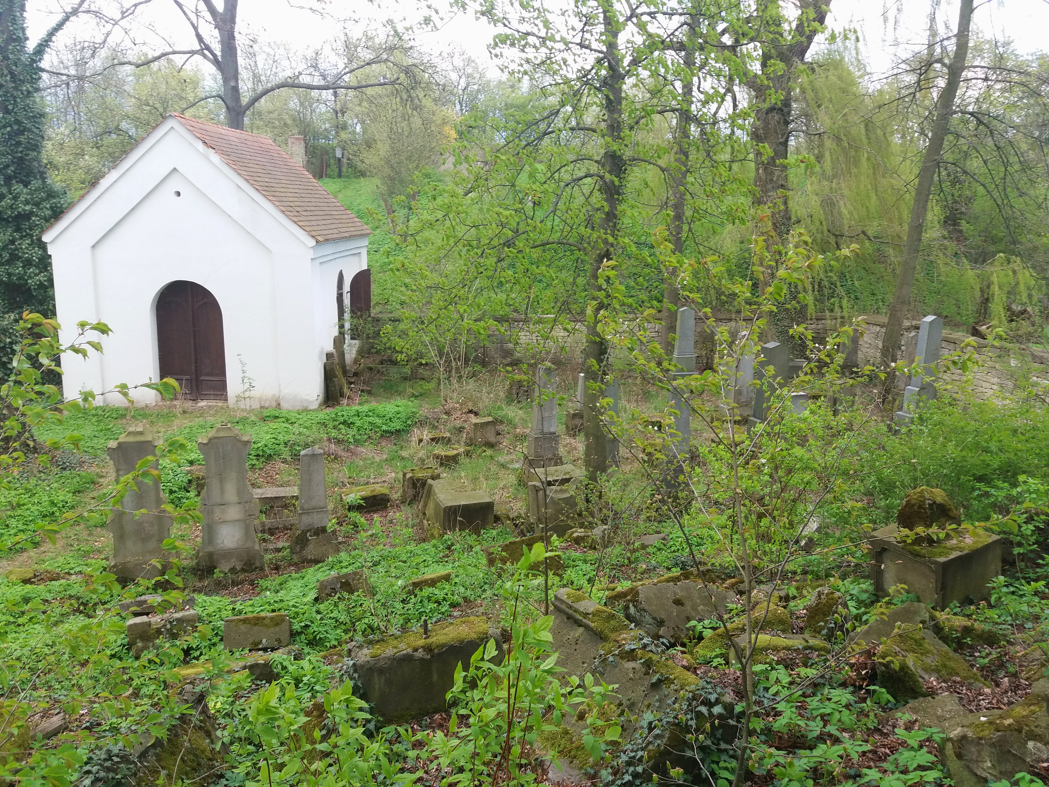 Židovský hřbitov v Litomyšli